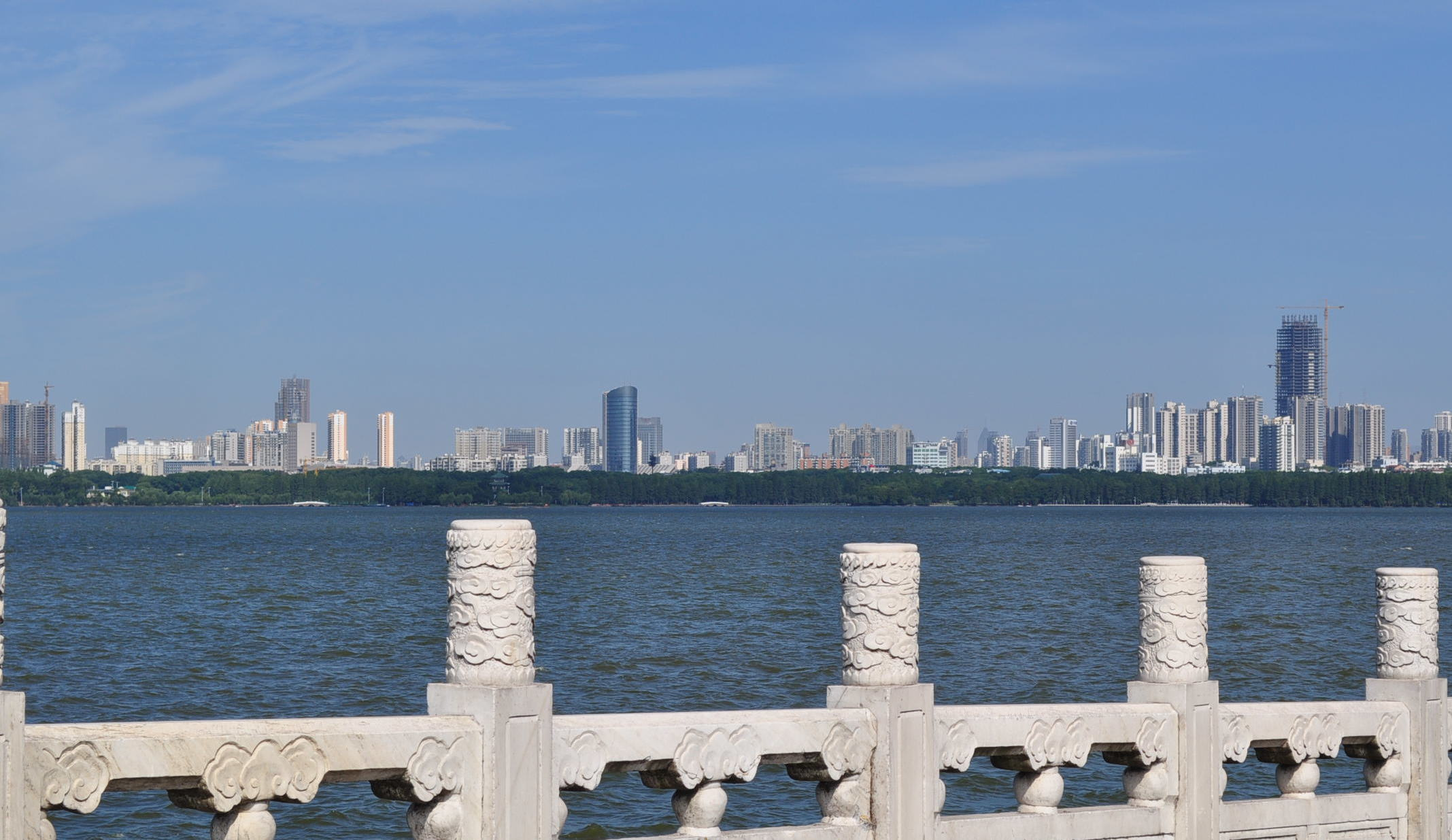 东湖远眺武昌